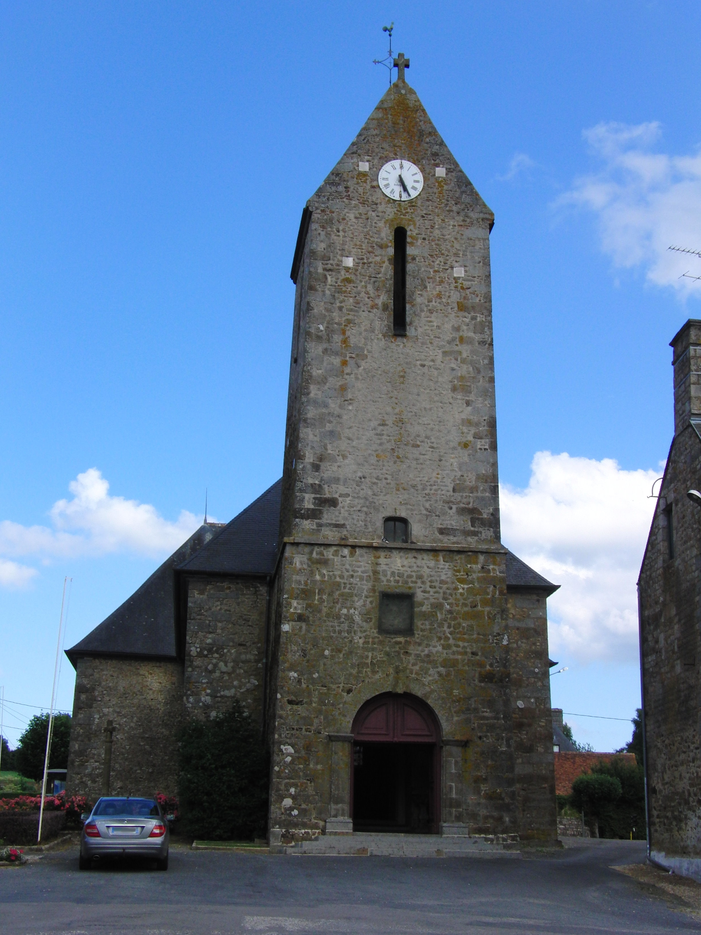 Église Notre-Dame de Champsecret, Orne, France .